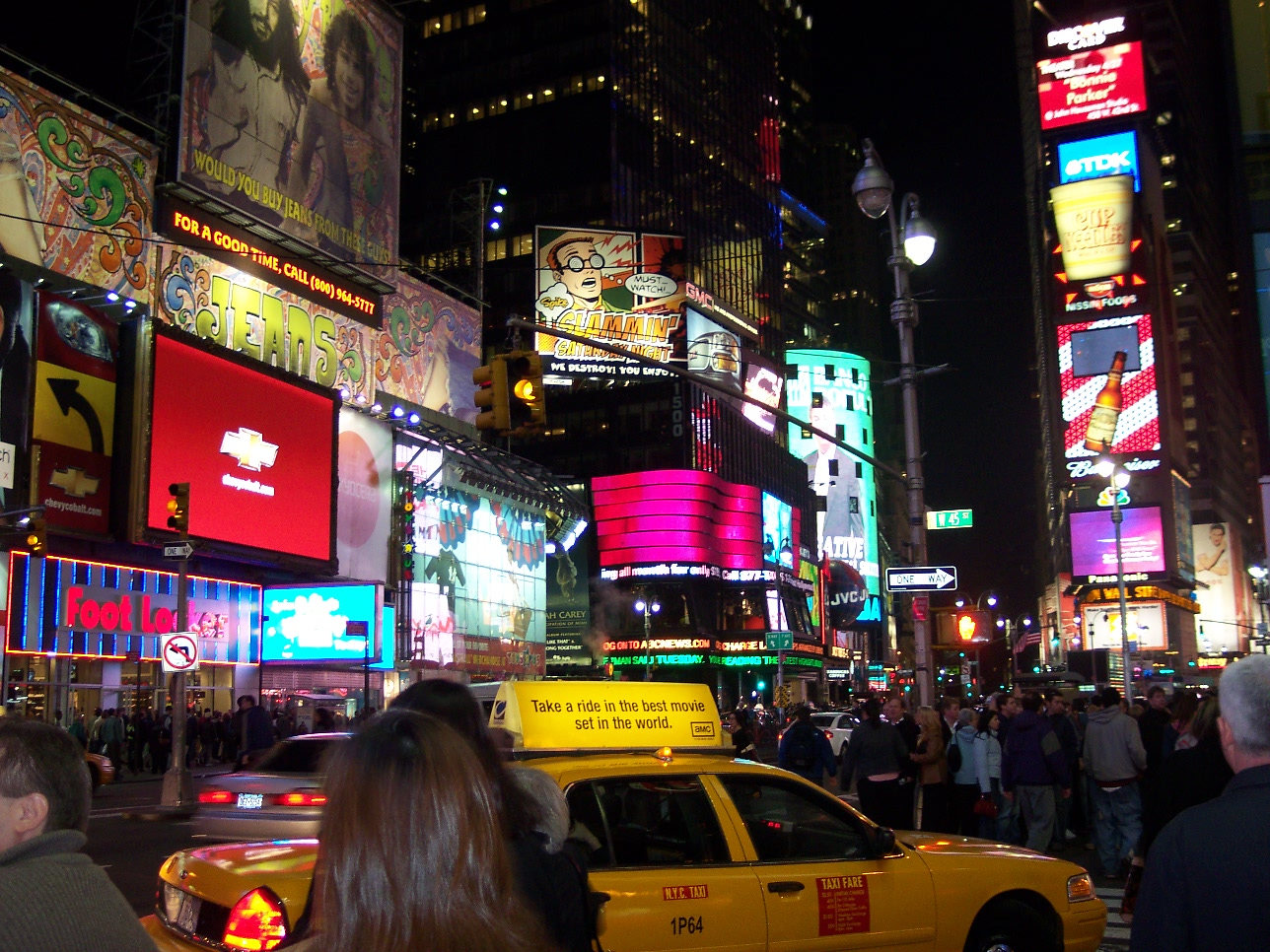 Times Square in april 2005